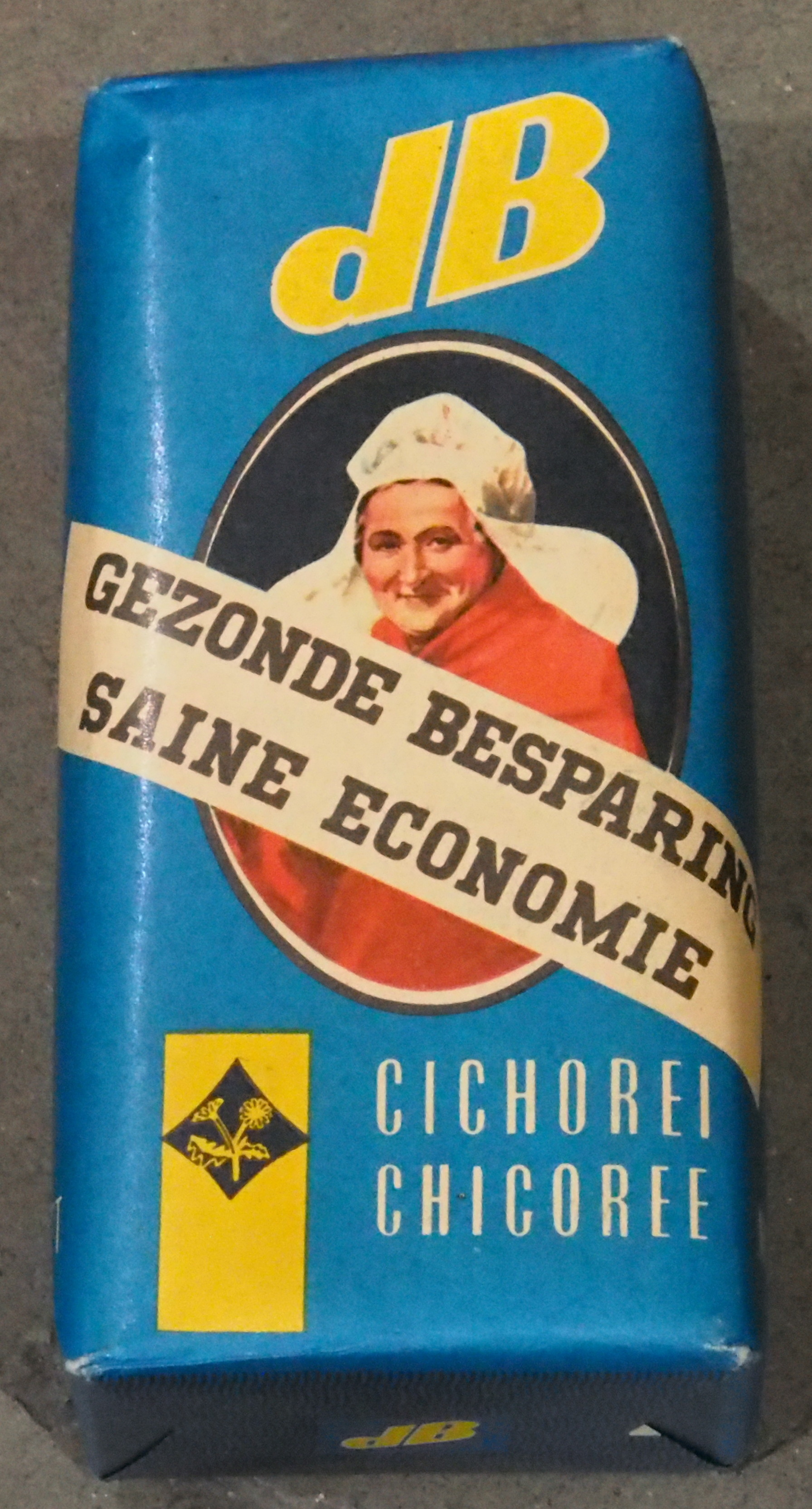 dB Cichorei